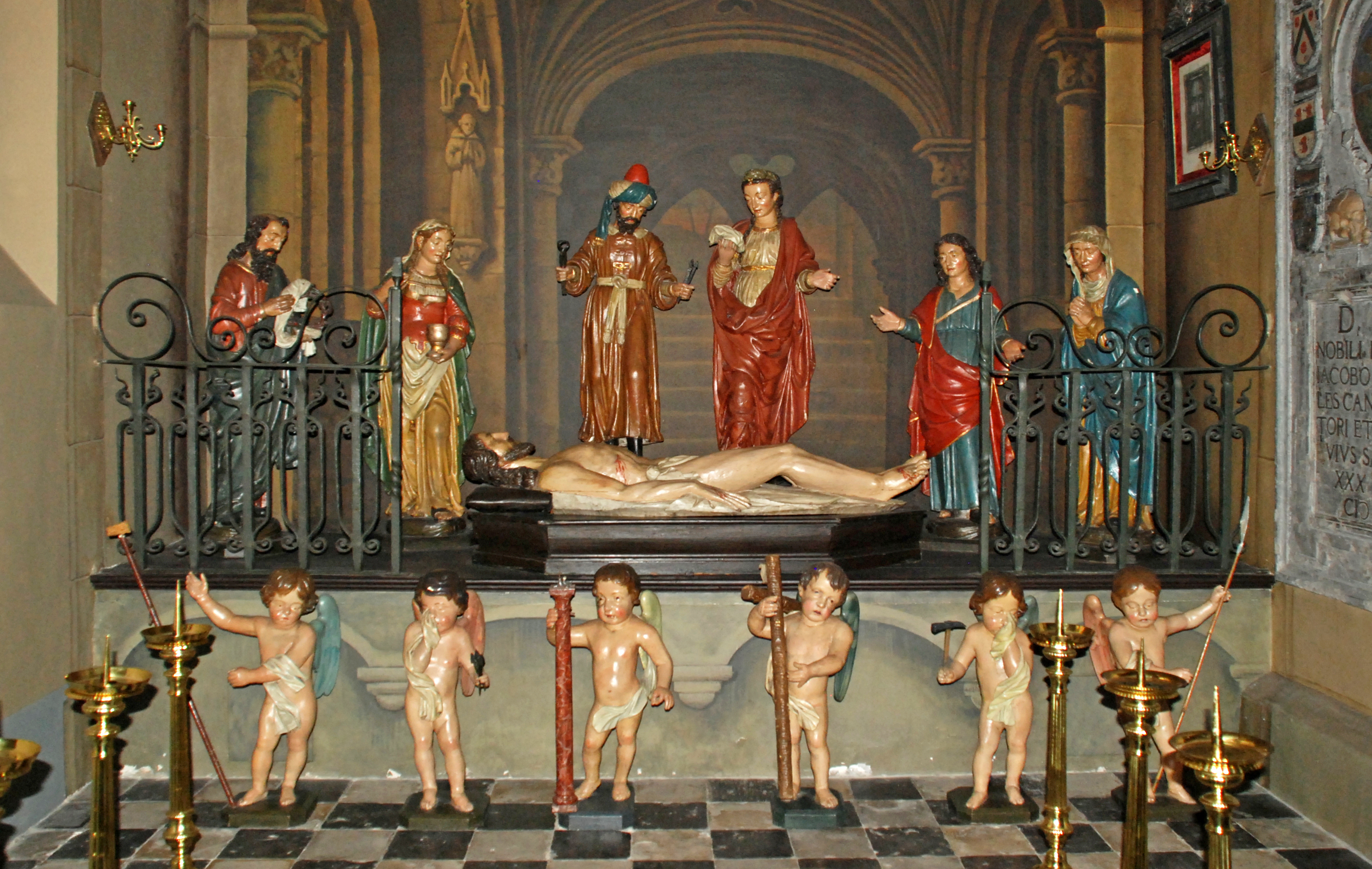 Belgique - Termonde - Église Notre-Dame (Déploration du Christ - bois polychrome 1618)